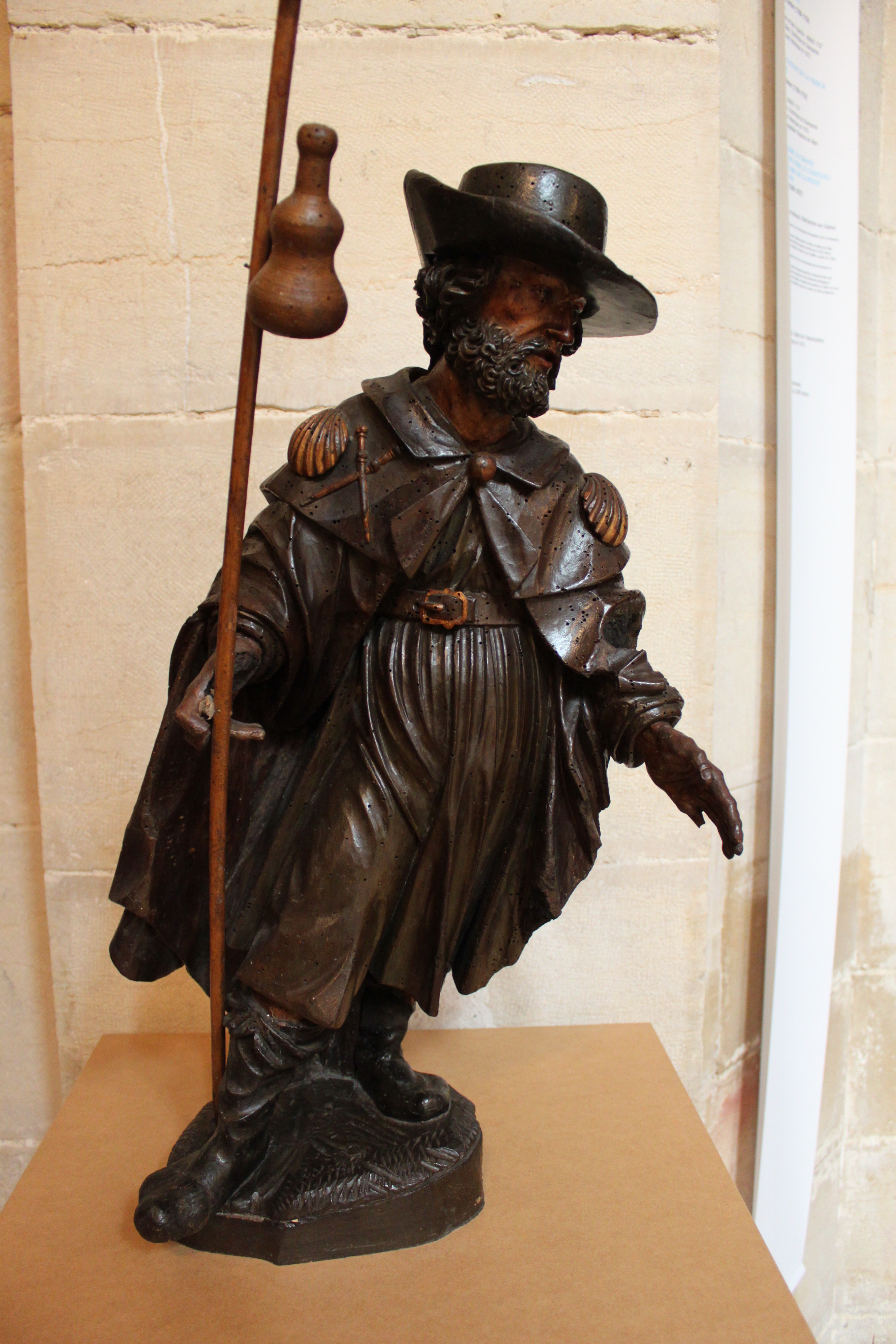 Jacques de Zébédée (Saint Jacques de Majeur), Musée d'art sacré de Dijon, Dijon, Côte-d'Or, Bourgogne, FRANCE